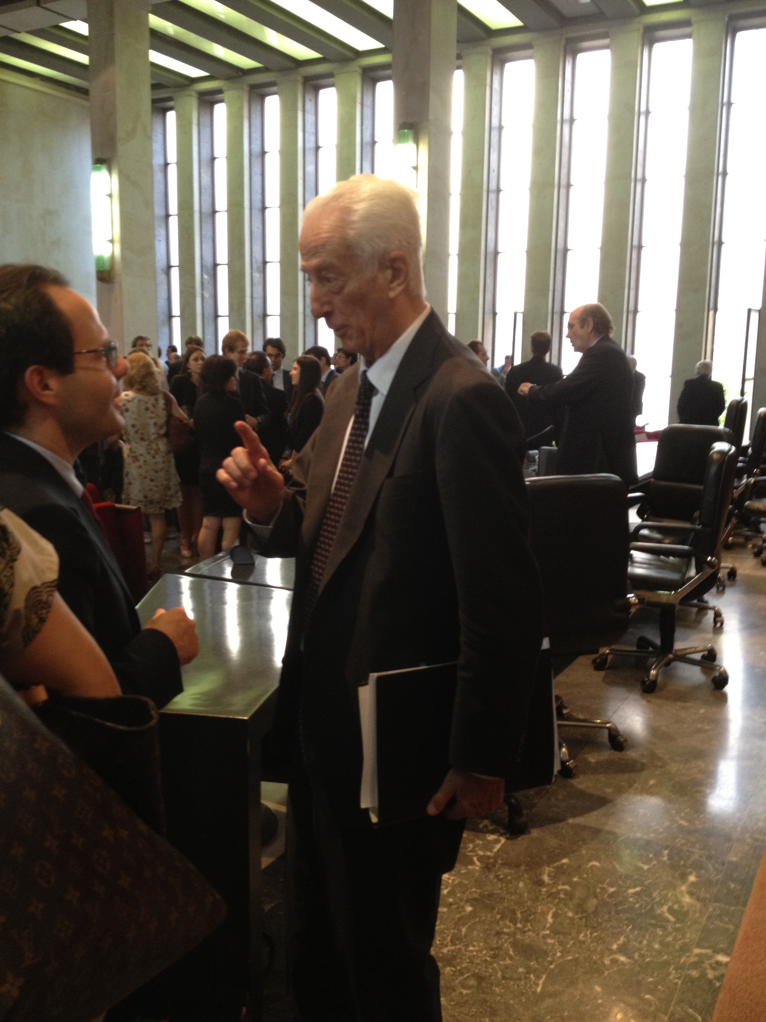 Franzo Grande Stevens